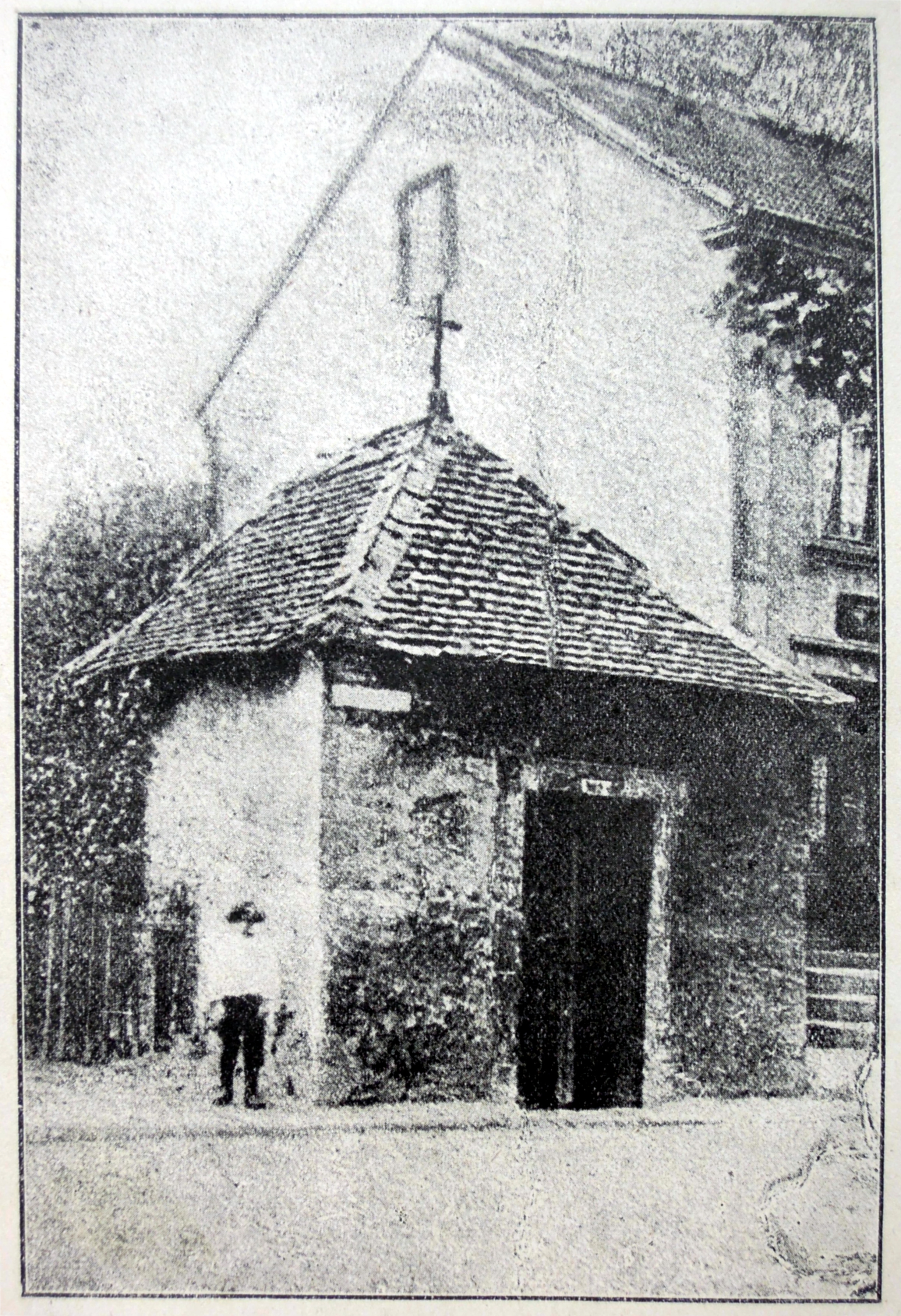 Odilienkapelle Ecke Trierer-, Dieffler-Straße